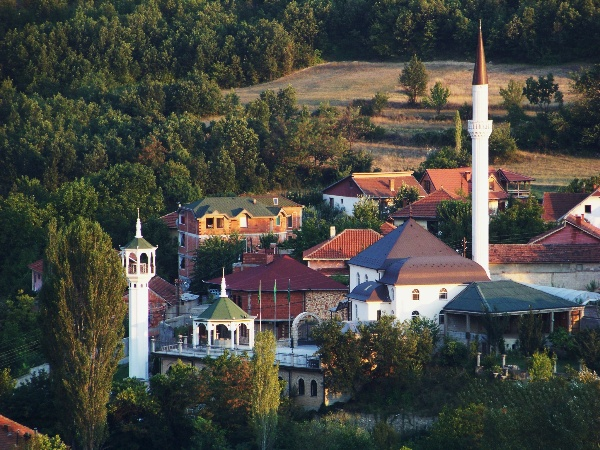 Arnakija